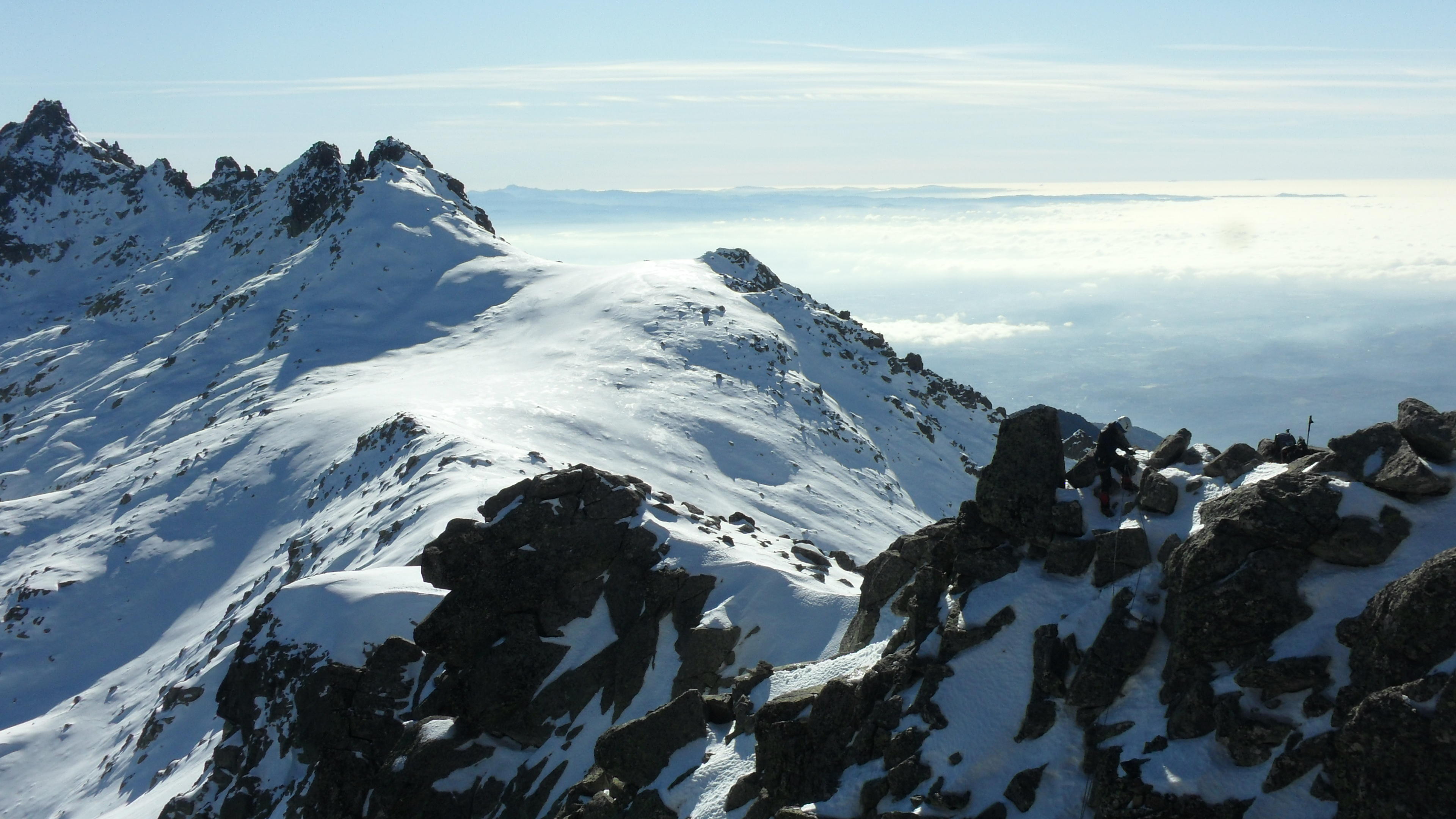 Galana This is a photography of a Special Area of Conservation in Spain with the ID: ES4110002. Natura2000 entry, EEA entry